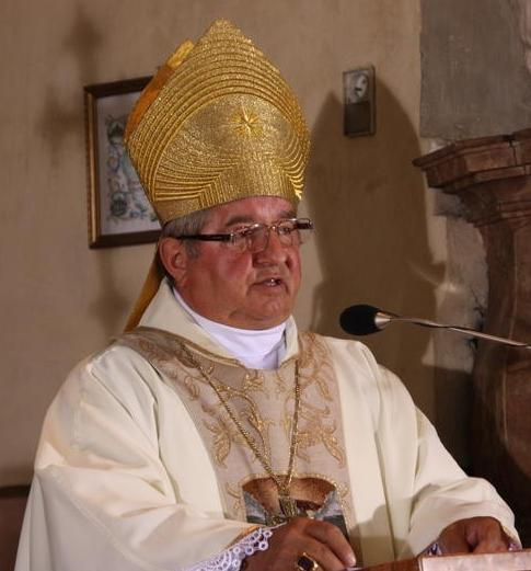 Arcybiskup Głódź podczas Mszy Świętej w Intencji Obrony Życia w I czwartek miesiąca sierpnia